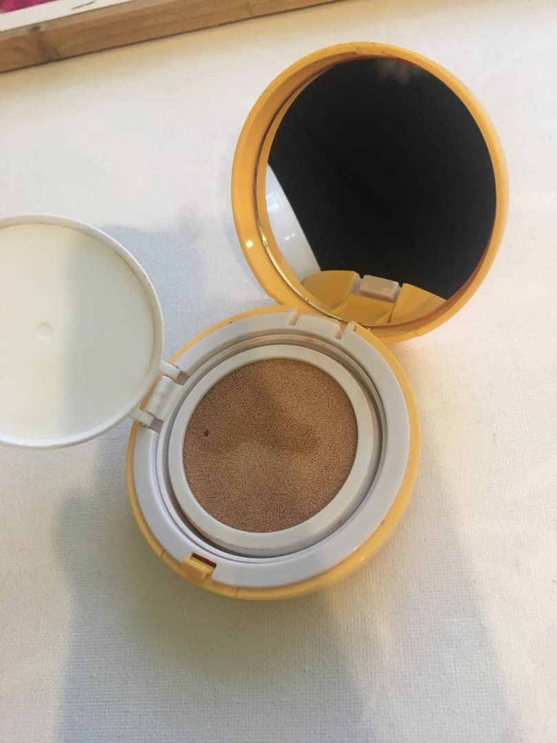 Косметический кушон